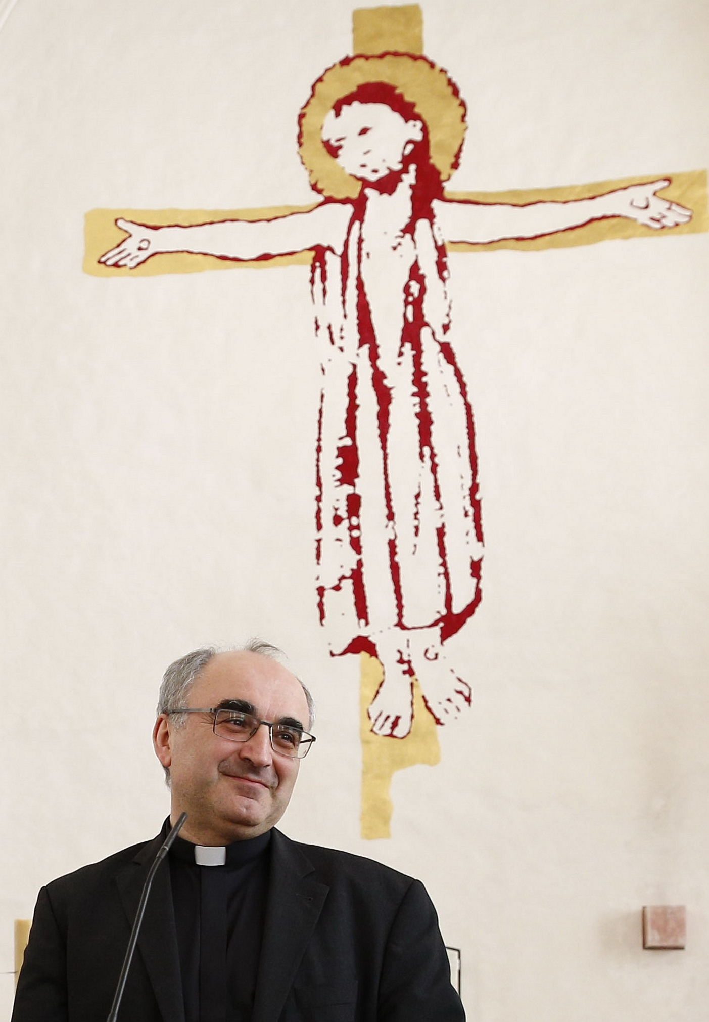 Diözesanbischof Dr. Wilhelm Krautwaschl Porträt, 16. April 2015